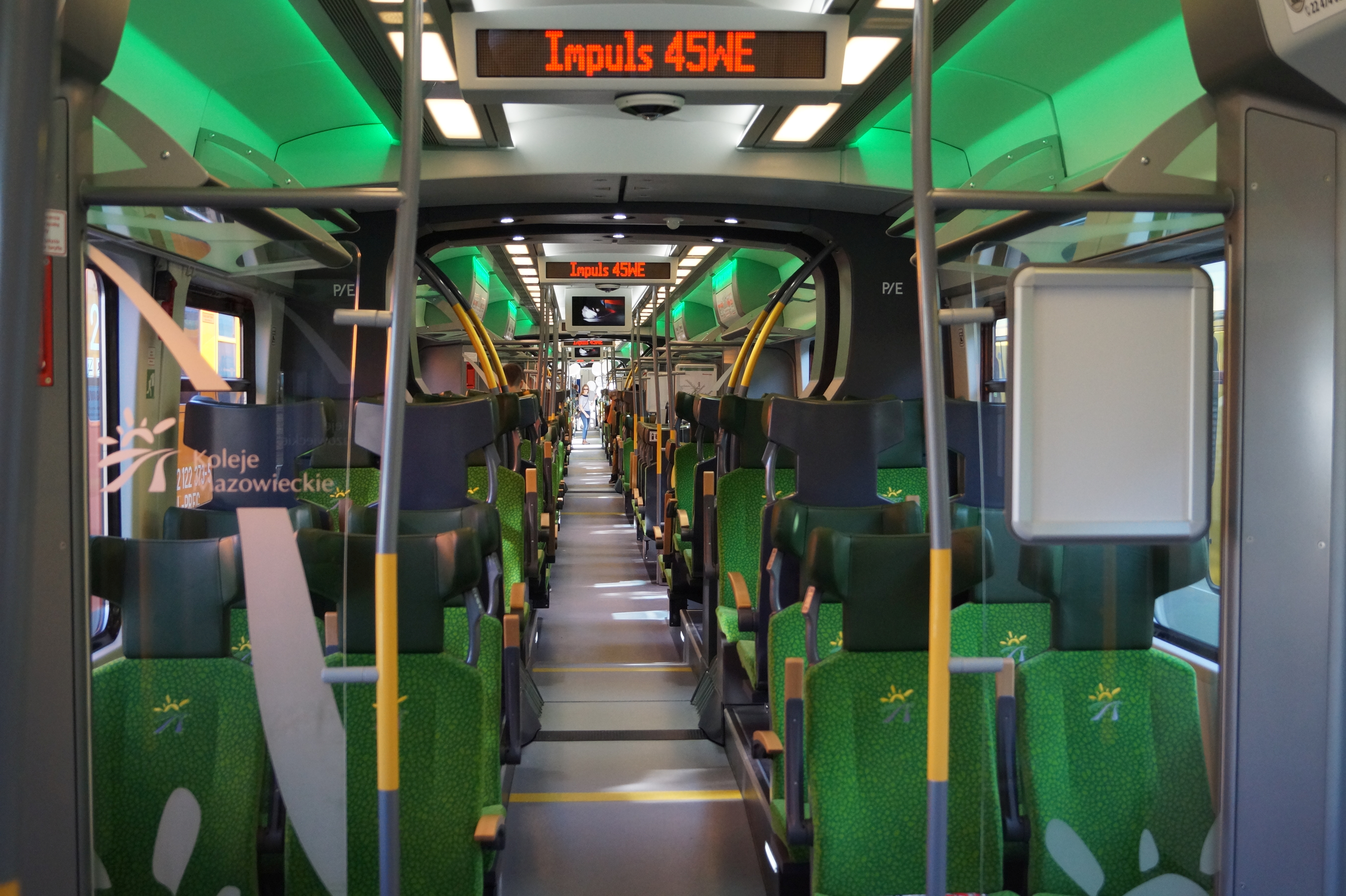 The making of this document was supported by Wikimedia Polska Association, within Wikigrant no. WG 2015-34. Wnętrze EZT 45WE (Newag Impuls) w barwach Kolei Mazowieckich wystawianego na Targach Trako 2015